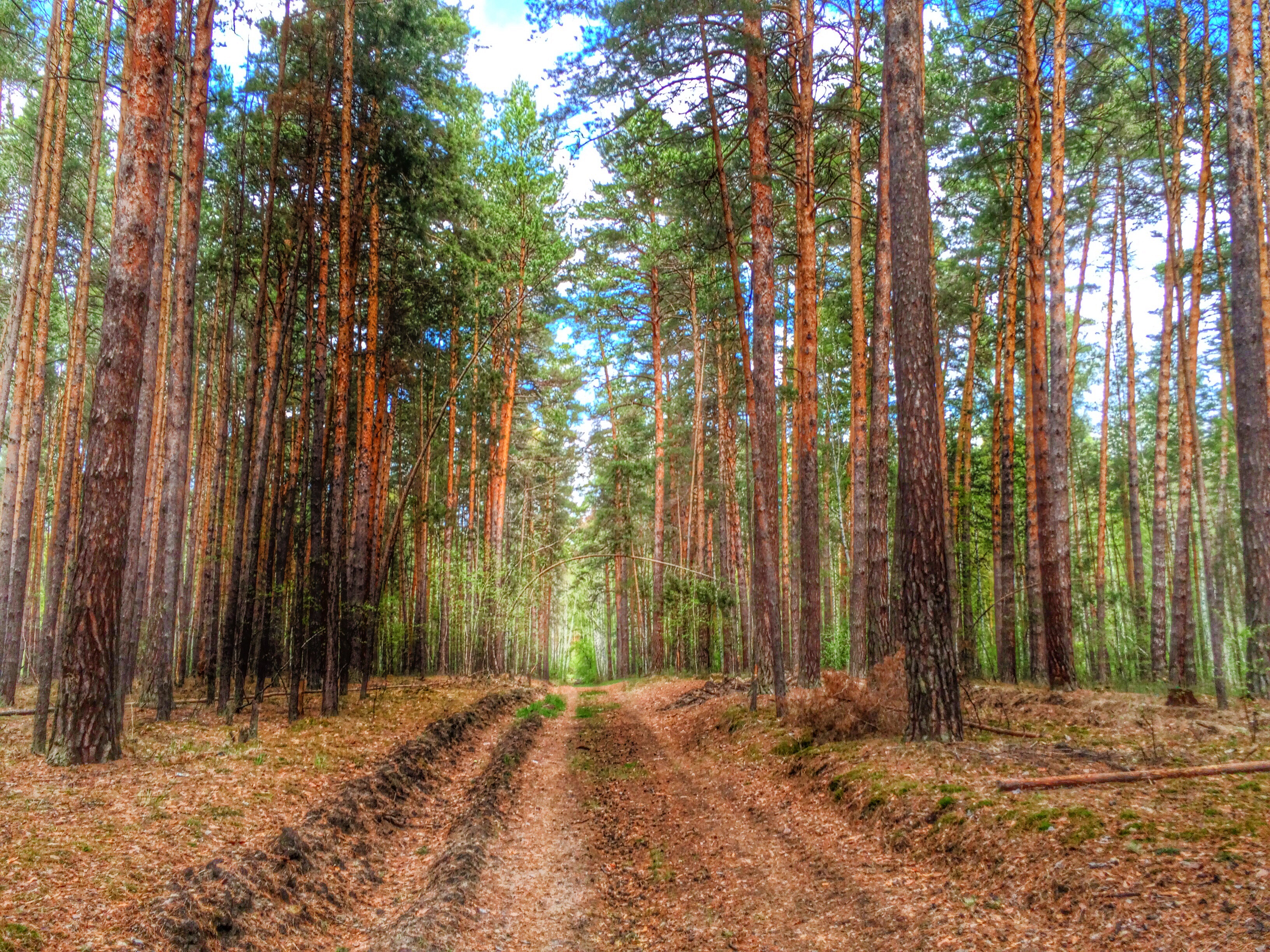 Мыльниковский боp, Шадpинский район This image is related to the protected area of Russia number 4510116